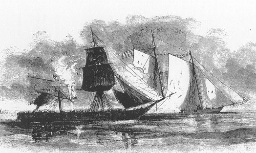 Gravure d'époque représentant la bataille navale de San Juan del Sur, livrée en 1856 entre un brick costa-ricain et une goélette des flibustiers américains pendant les guerres de Walker.